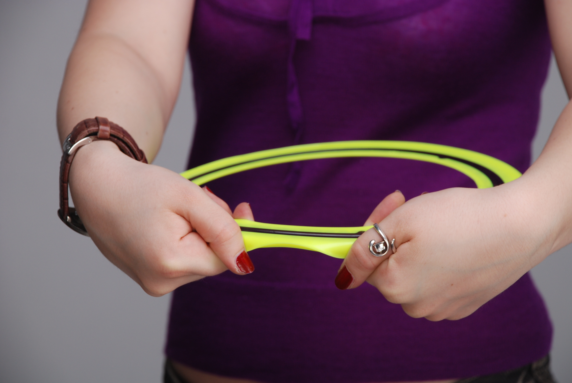 Края у кольца Aerobie мягкие и гибкие